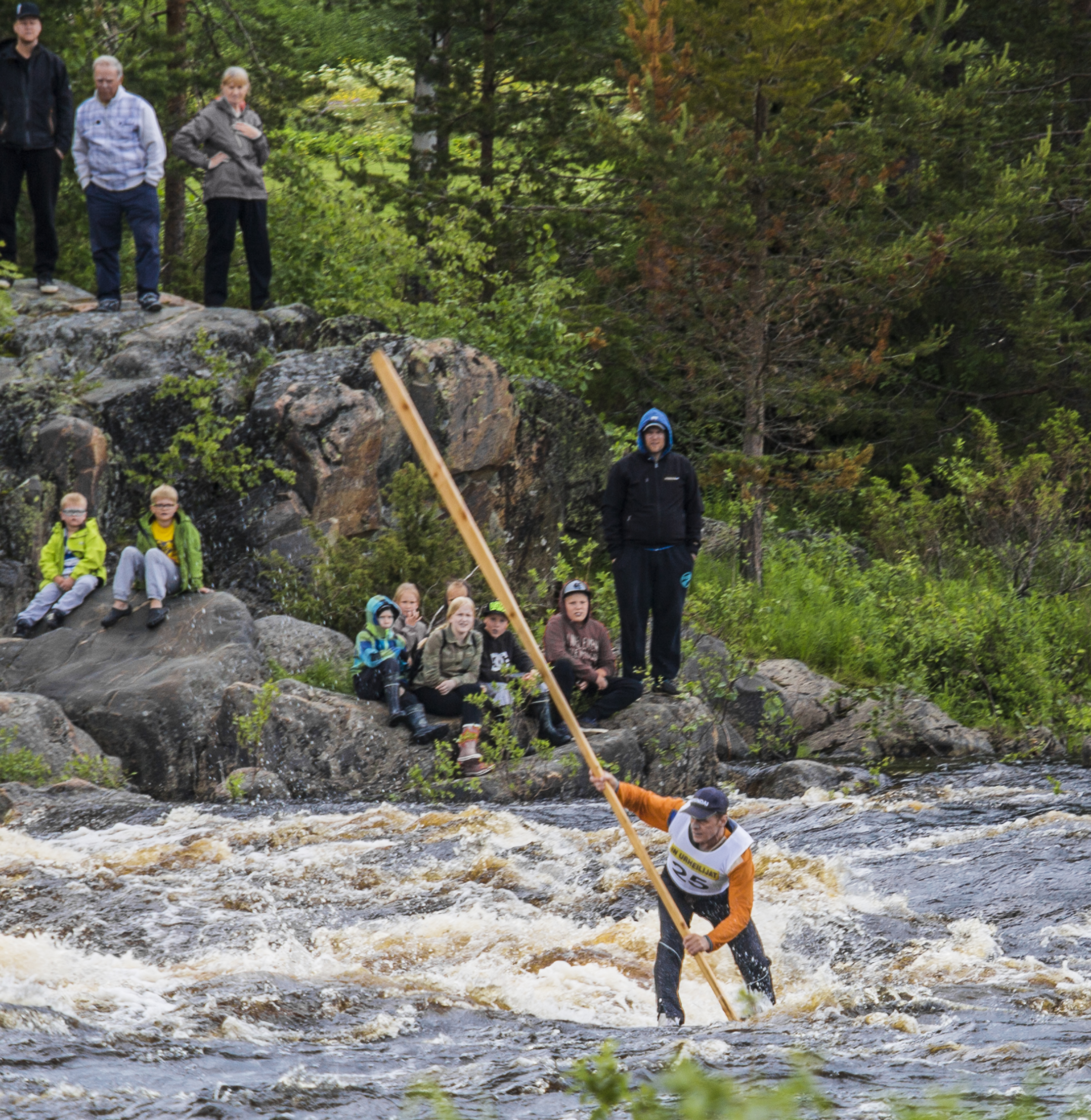 Kuningasjätkä, Tukkilaiskisat Iin Raasakkakoskella 4.7.2015, Koskenlasku